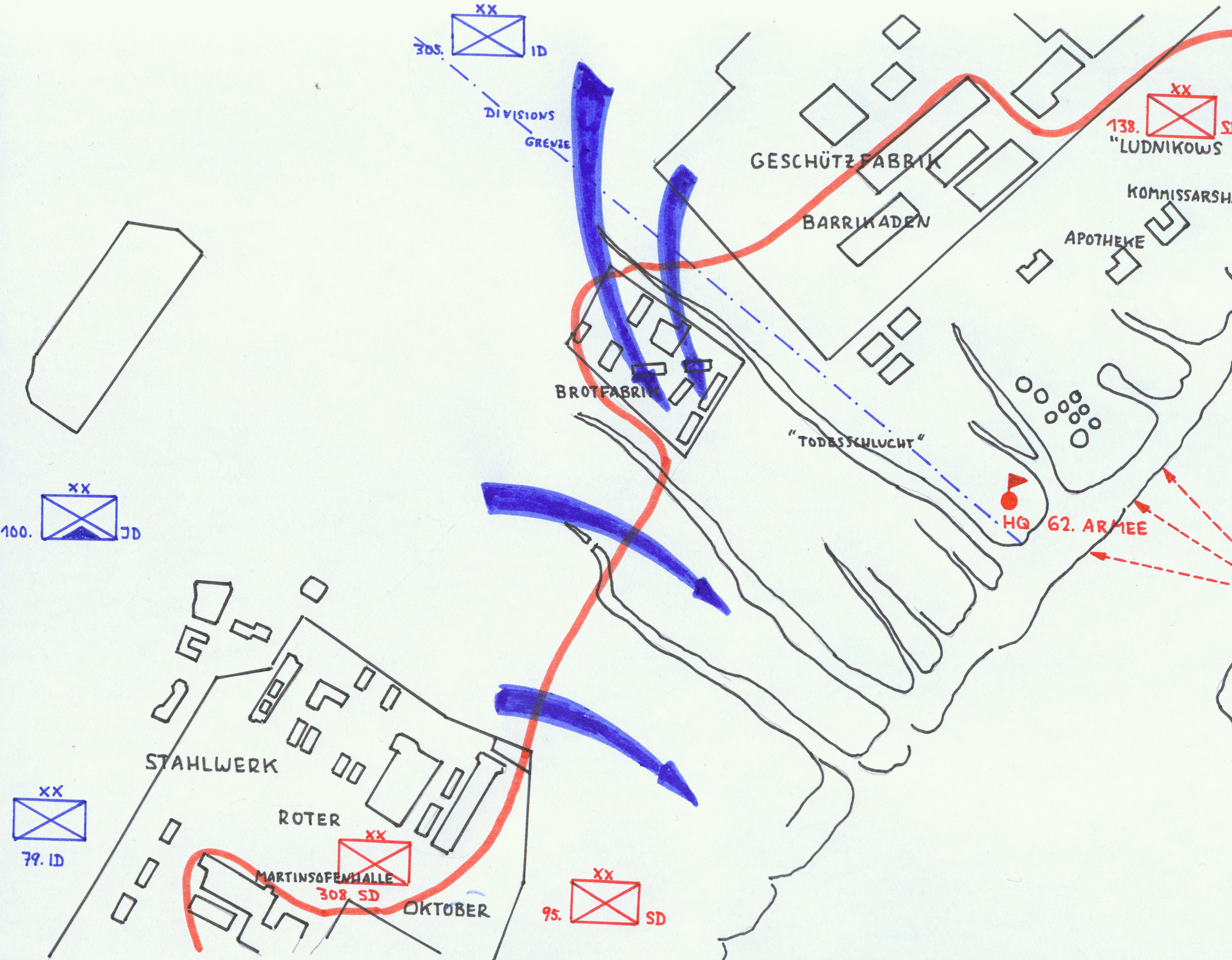 Stalingrad Frontverlauf Barrikaden - Roter Oktober.